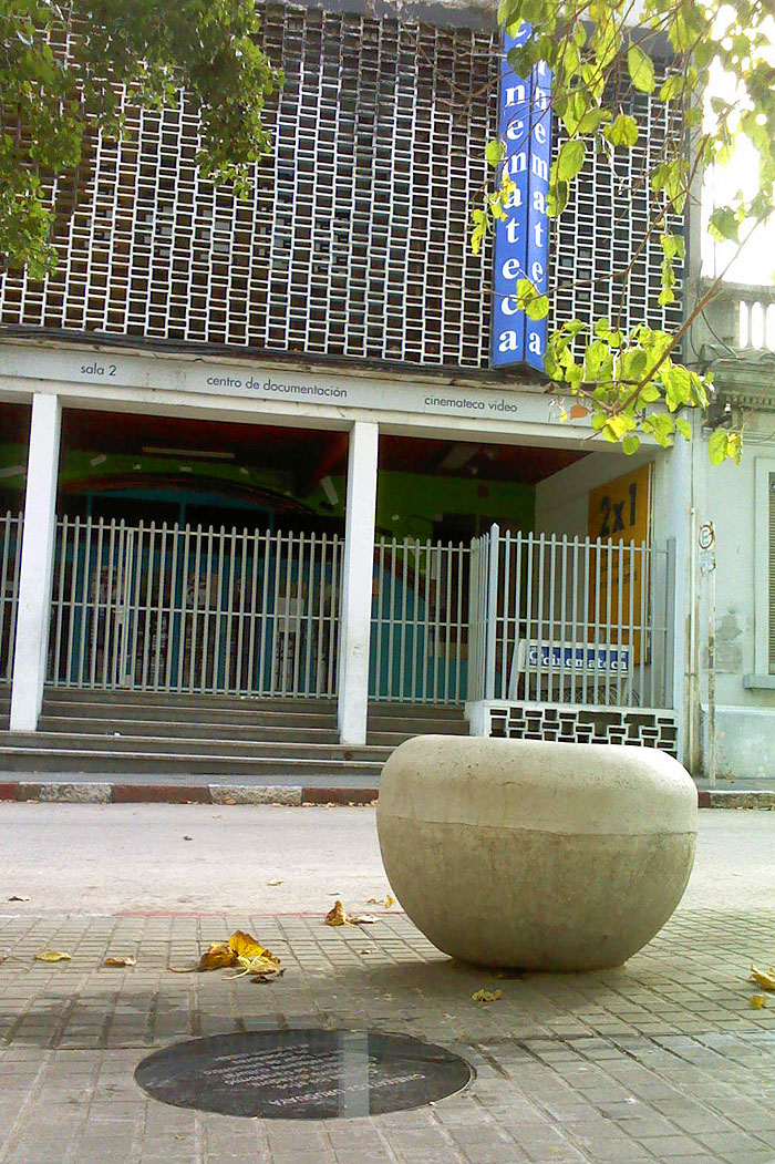 Marca de la memoria frente a Cinemateca Uruguaya (Montevideo)